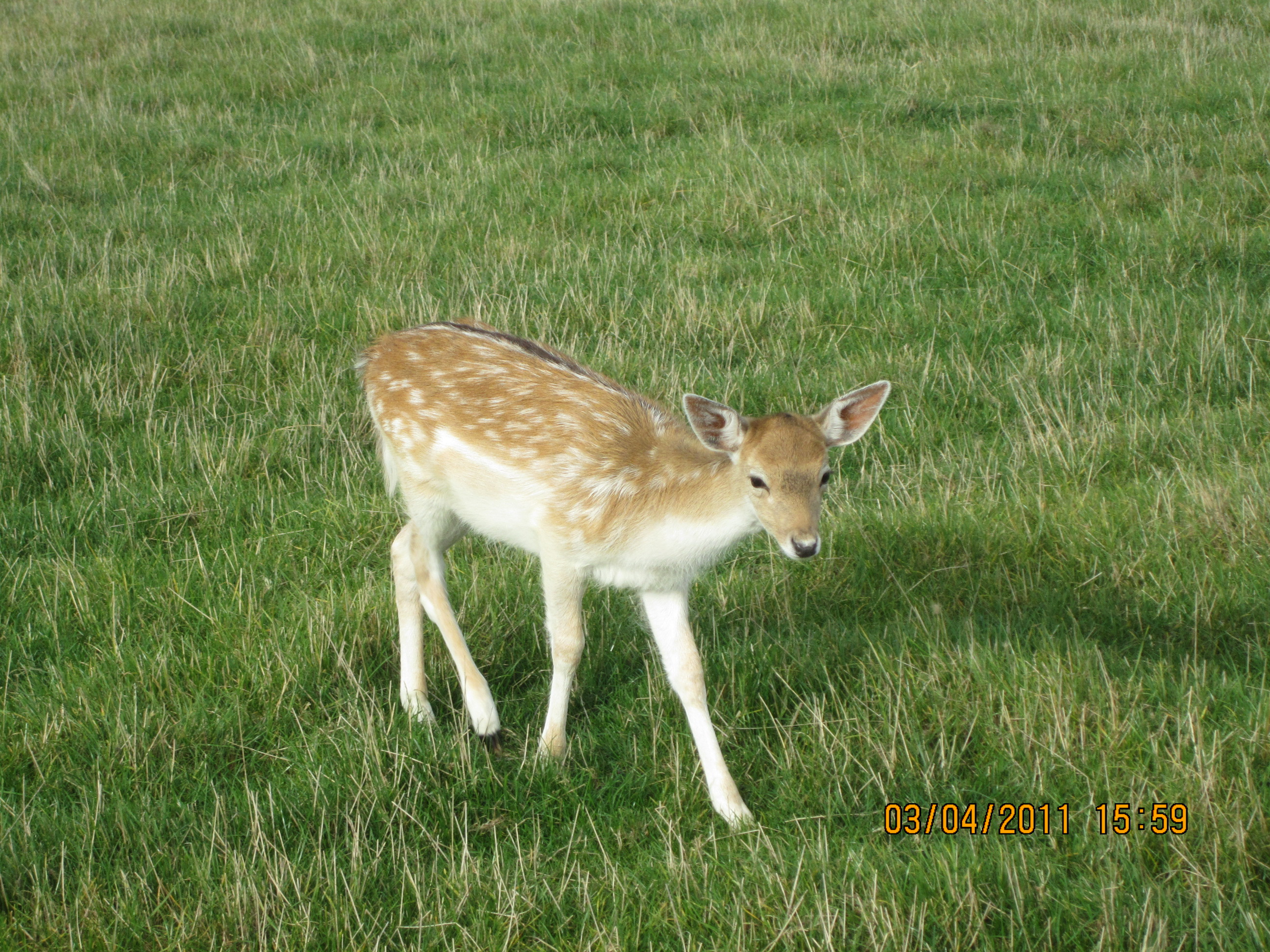 हरीण